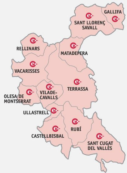 Estructura de les demarcacions de la Cambra de Terrassa.